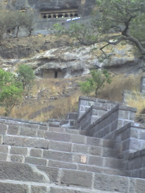 Lenyadri Temple